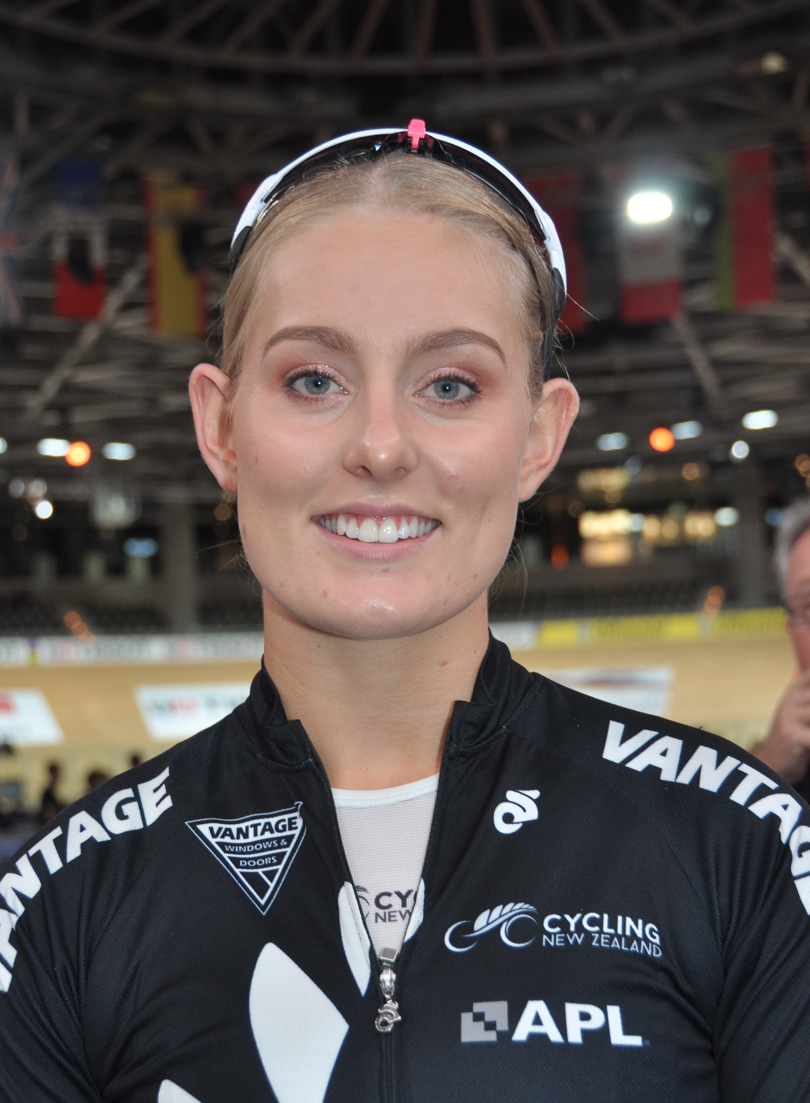 Olivia Podmore, Radsportlerin aus Neuseeland